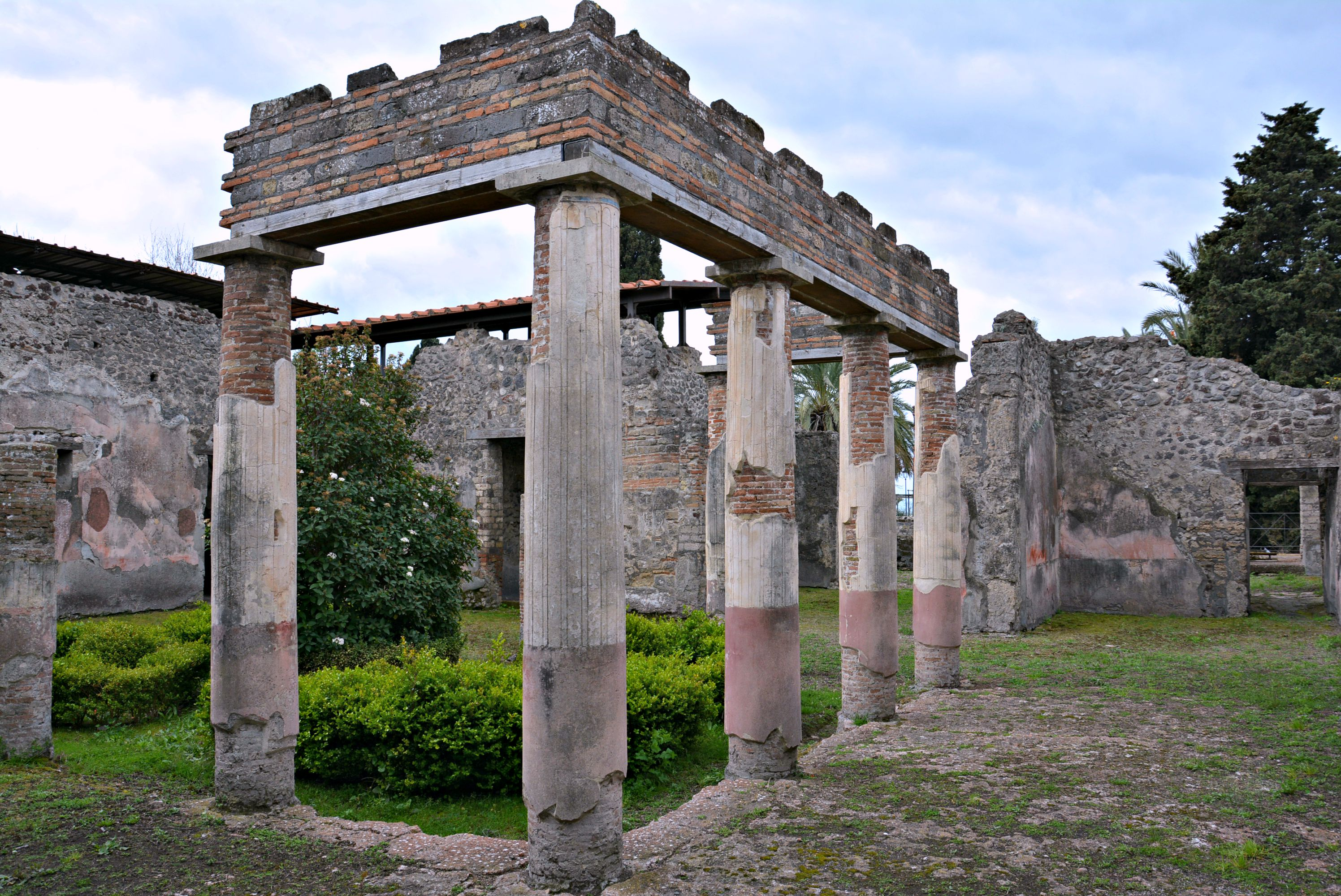 Bottega - MIBACT This is a photo of a monument which is part of cultural heritage of Italy.